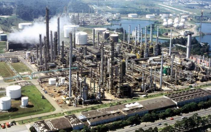 De: Portal Opinião Pública